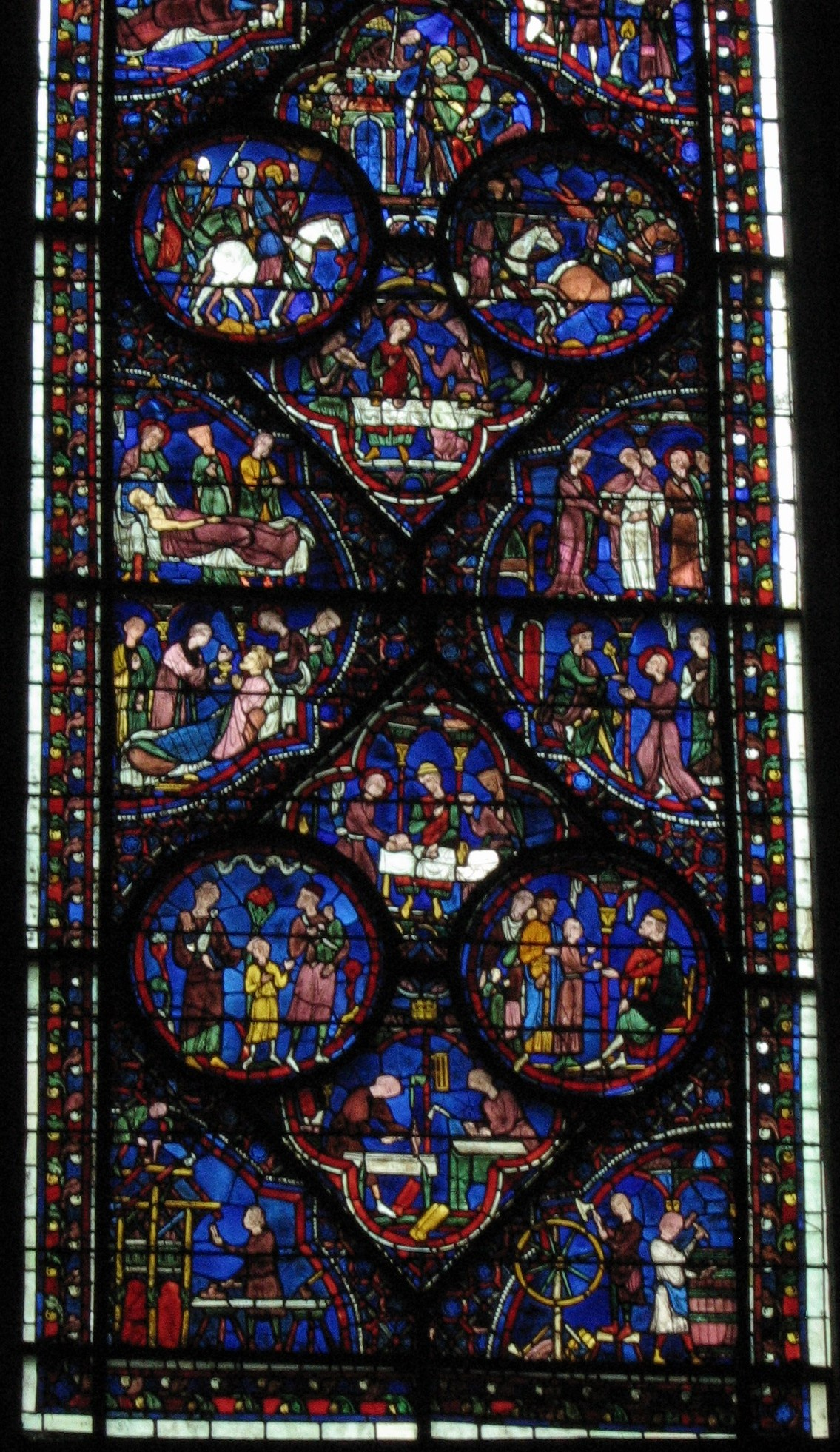 vitrail de la cathédrale de Chartres, Eure-et-Loir (France).